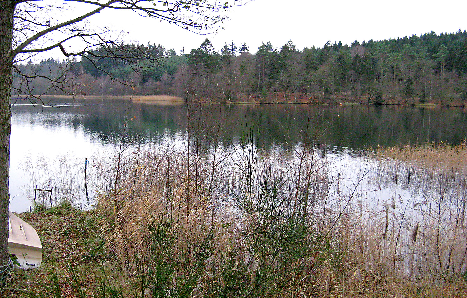 Almindsø ved Silkeborg i Jylland